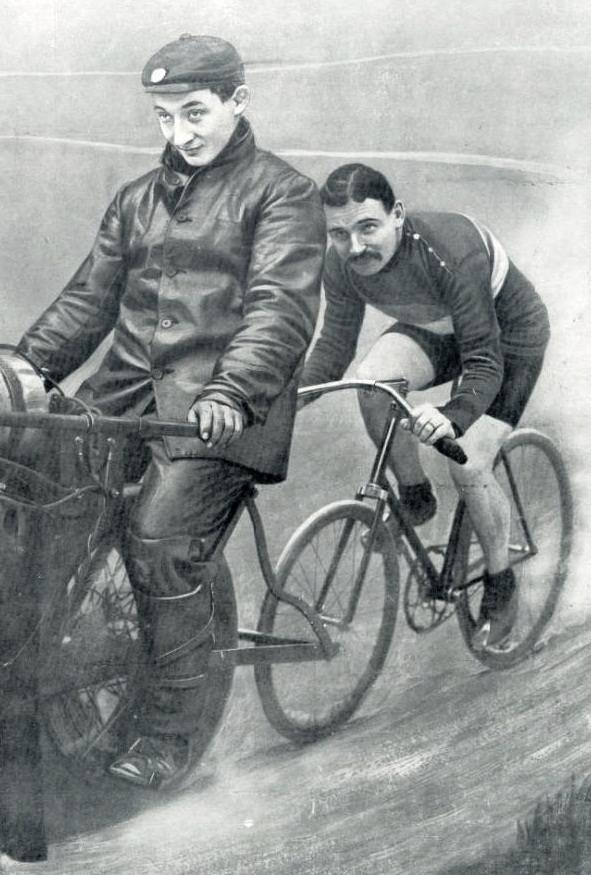 15 septembre 1909, Paul Guignard atteind 101,623 kilomètres dans l'heure derrière Hoffmann, sur le vélodrome de Munich. Il est le premier homme à dépasser les 100 kilomètres dans l'heure sur un vélocipède.